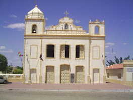 Igreja Matriz de Caraúbas